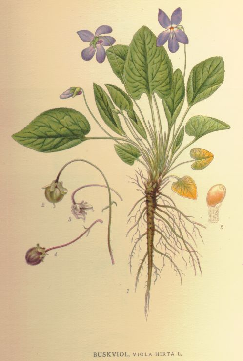 Viola hirta 1. blommande stånd med vårblommor 2. dess fröhus (nat. storl.) 3. detsamma efter frönas avlägsnande 4. fröhus av en kleistogam blomma 5. seed (5/1)